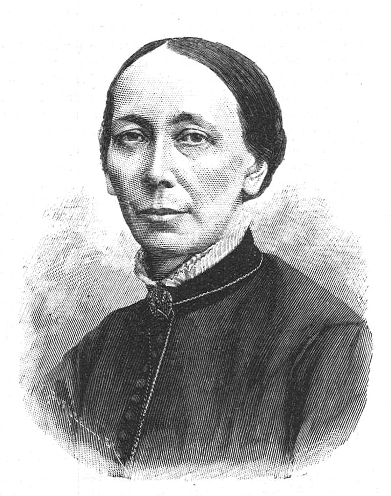 Regina Pallin (1834-1889)